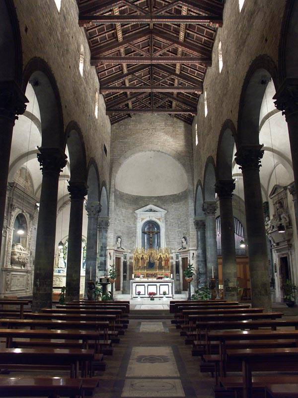 Luca Gemelli / Foto interno Chiesa SS. Apostoli Firenze /CC-BY-SA2.5 /